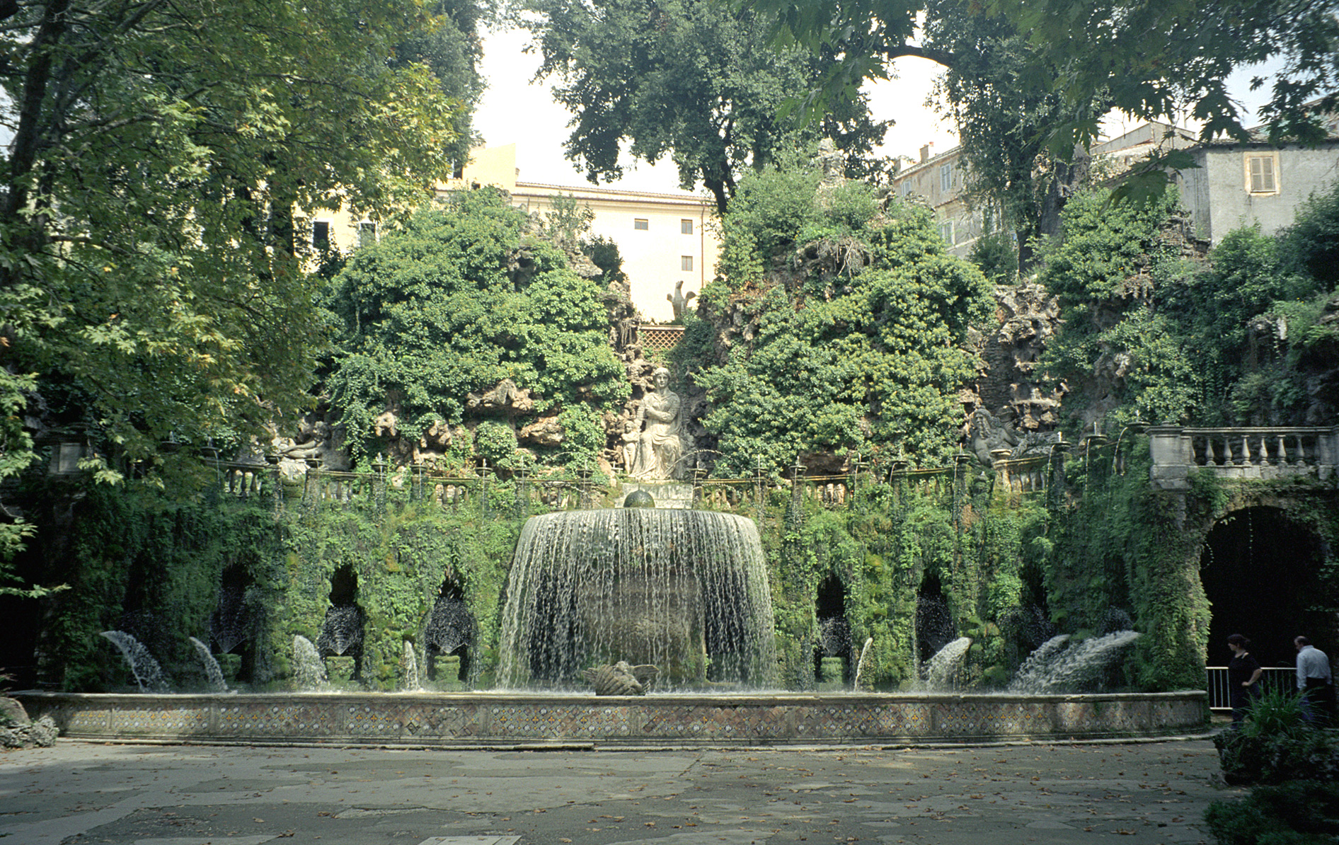 Villa d'Este, Tivoli